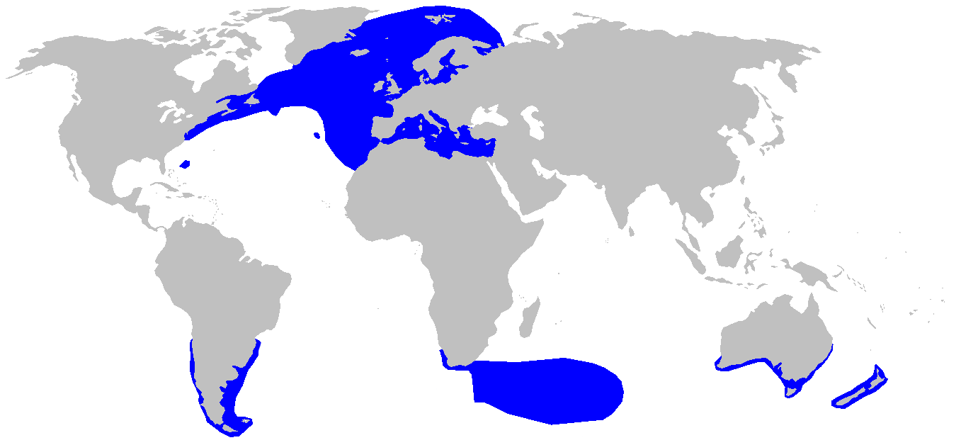 Distribution map for Lamna nasus